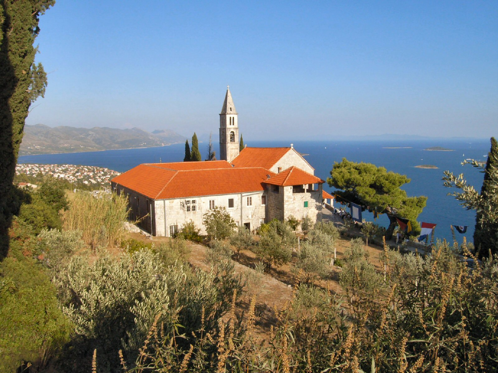 Orebić,Franziskanerkloster mit der Kirche Madonna der Engel